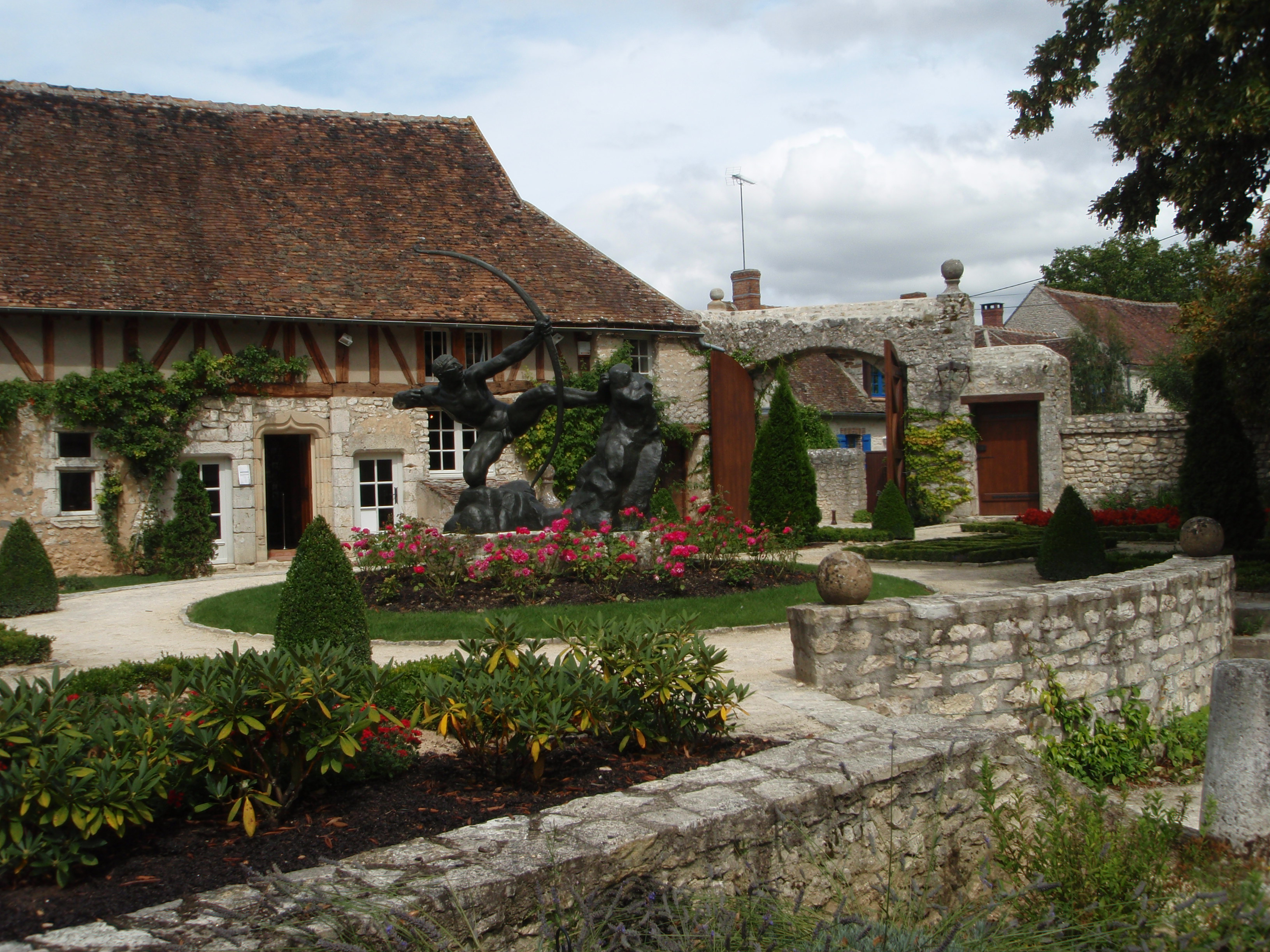 Héraklès Archer au Jardin musée d'Egreville en Seine et Marne Paris France. Première version